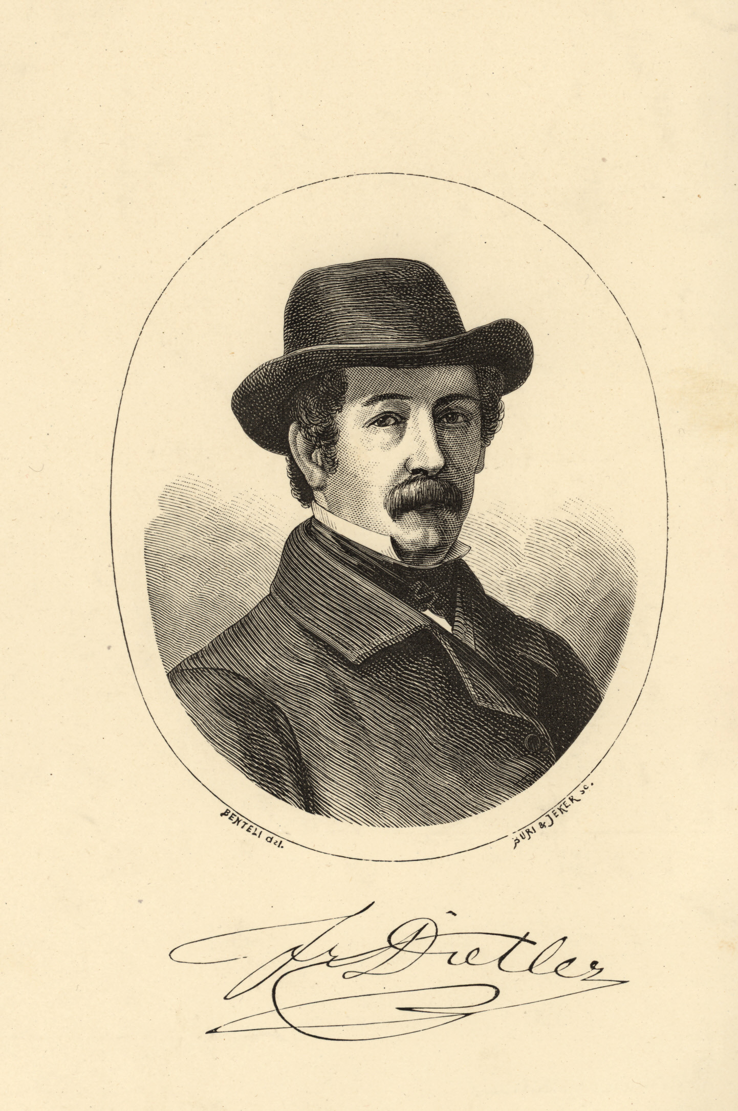 Bildnis Johann Friedrich Dietler (1804-1874).